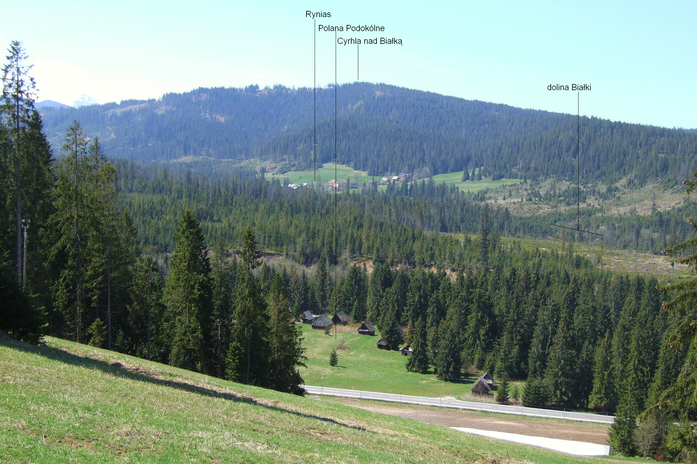 Widok ze stoku wyciągów narciarskich w Jurgowie